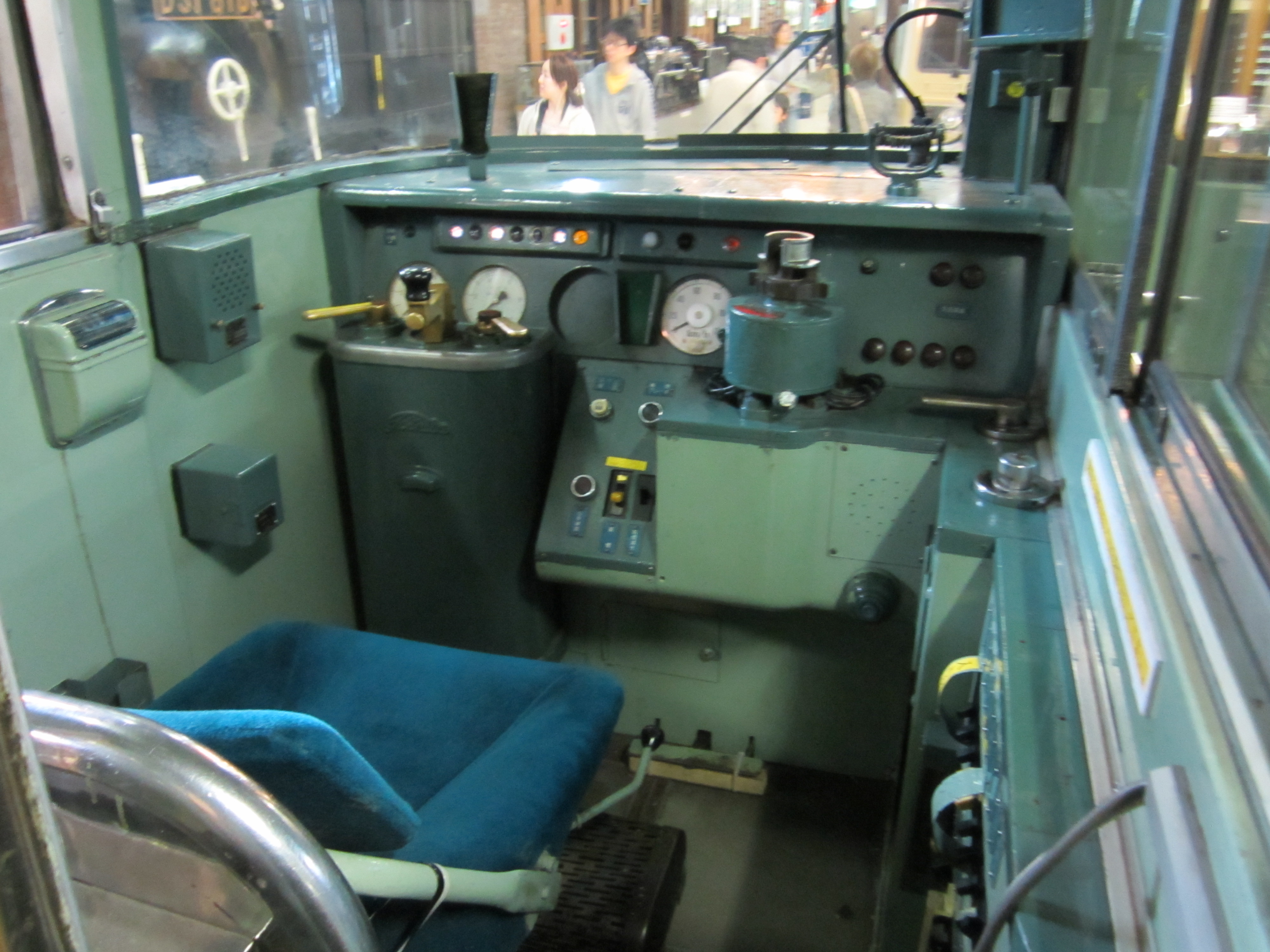 キハ82 運転席（北海道鉄道技術館にて）